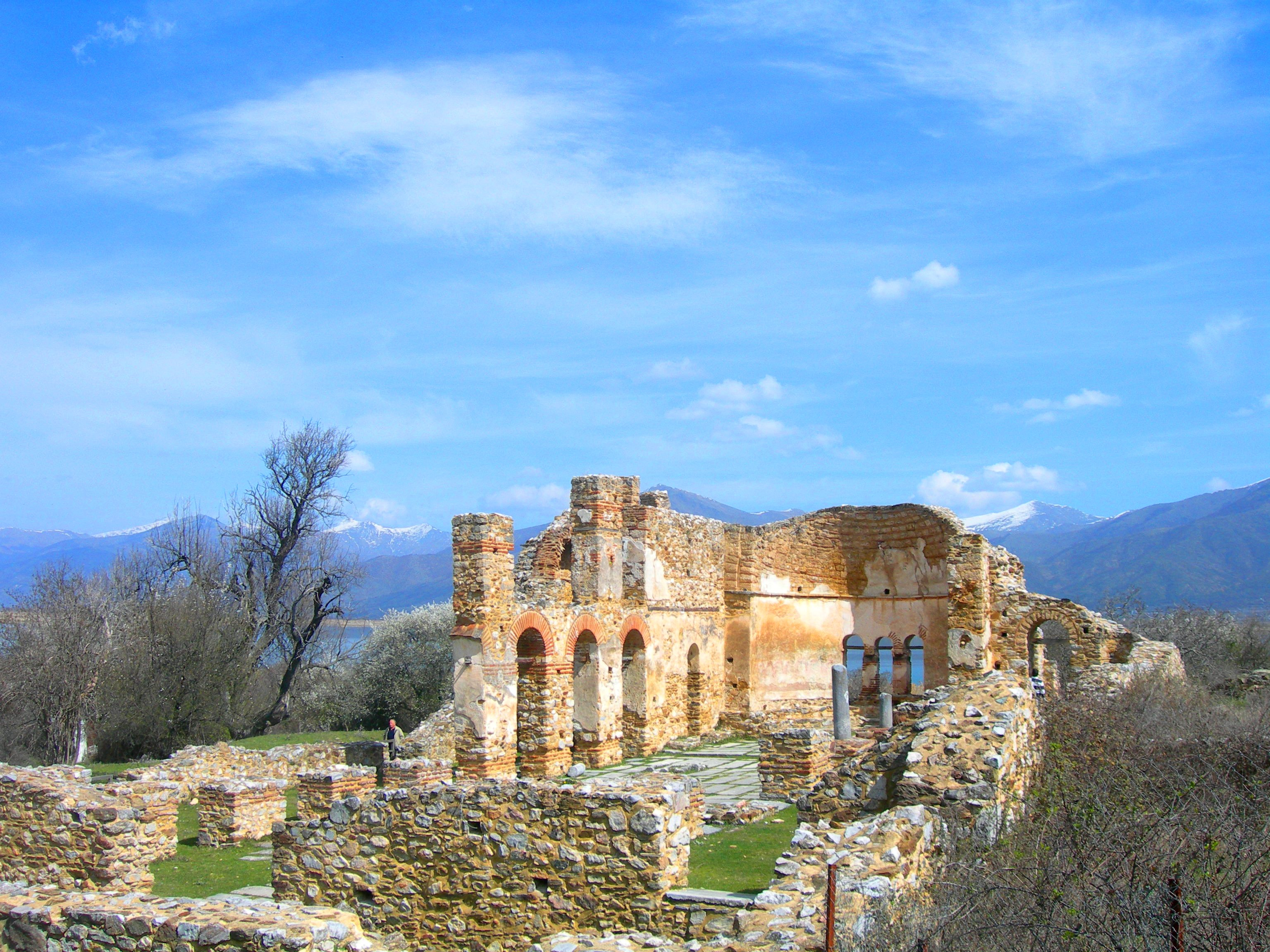 Βασιλική Αγίου Αχιλλείου«Βασιλική Αγίου Αχιλλείου»